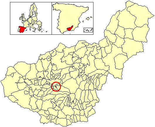 Situación del término municipal de Cájar respecto a la provincia de Granada, en España.